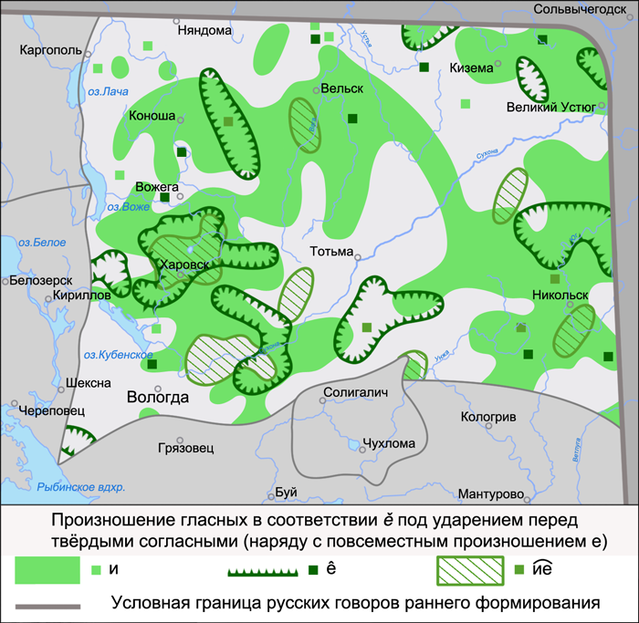 Карта произношения гласных в соответствии ě перед твёрдыми согласными в вологодских говорах. Источники: Захарова К. Ф., Орлова В. Г., Сологуб А. И., Строганова Т. Ю. Образование севернорусского наречия и среднерусских говоров / Ответственный редактор В. Г. Орлова. — М.: «Наука», 1970. — С. 257 (Карта 69. Произношение ударенных гласных в соответствии ě перед твёрдыми согласным)